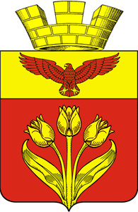 Герб городского поселения Палласовка